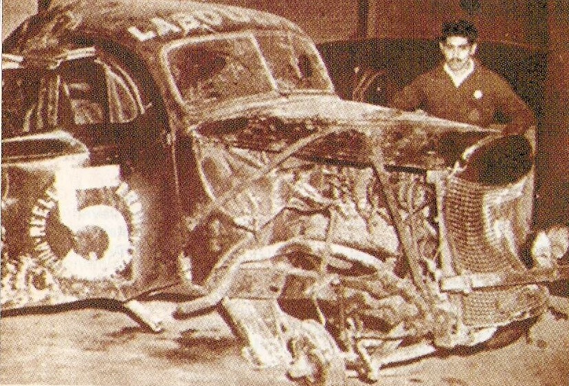 Coche luego del accidente fatal de Ricardo Risatti I, el 25 de agosto de 1951.